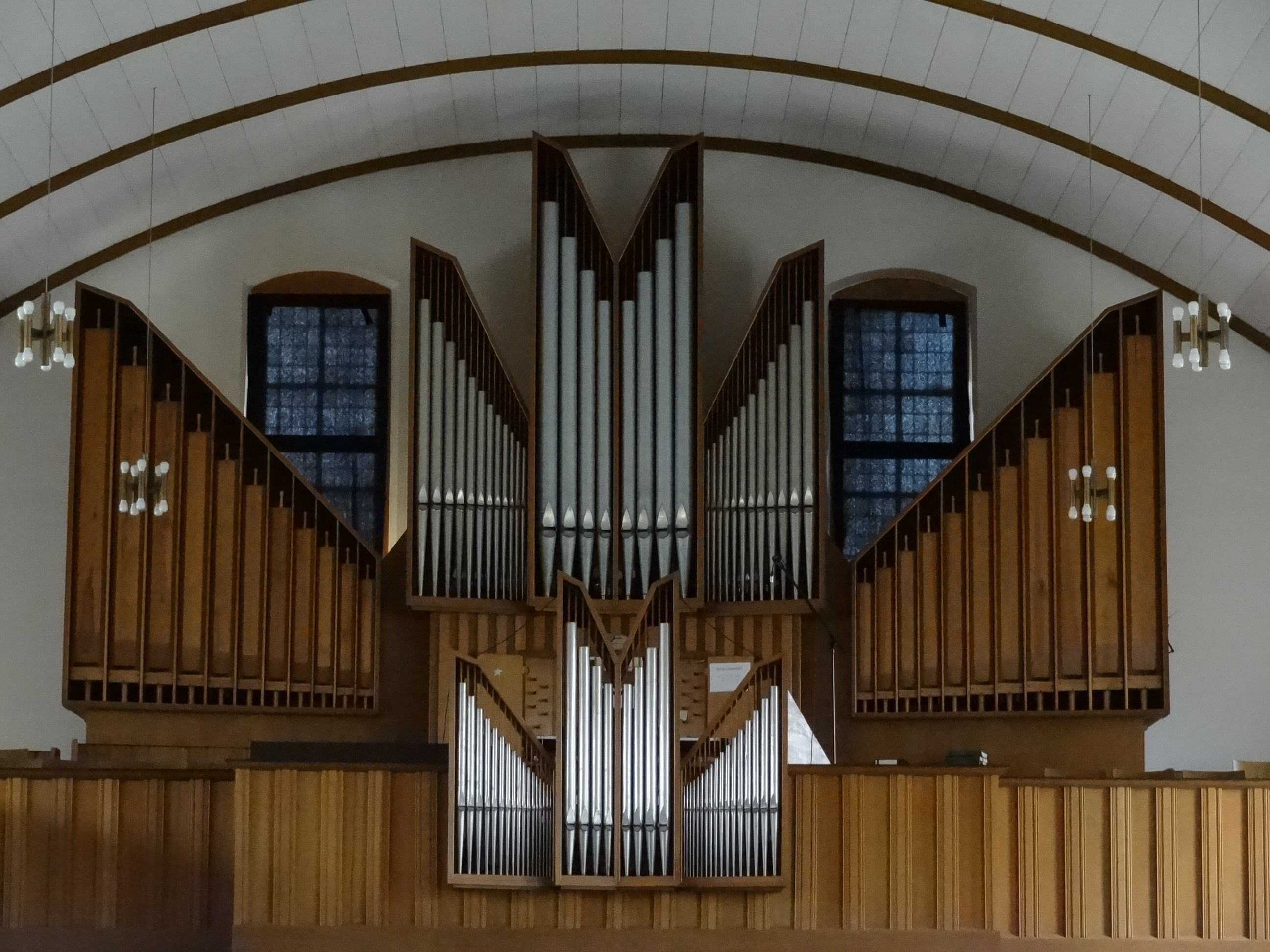 Evangelische Kirche Watzenborn-Steinberg